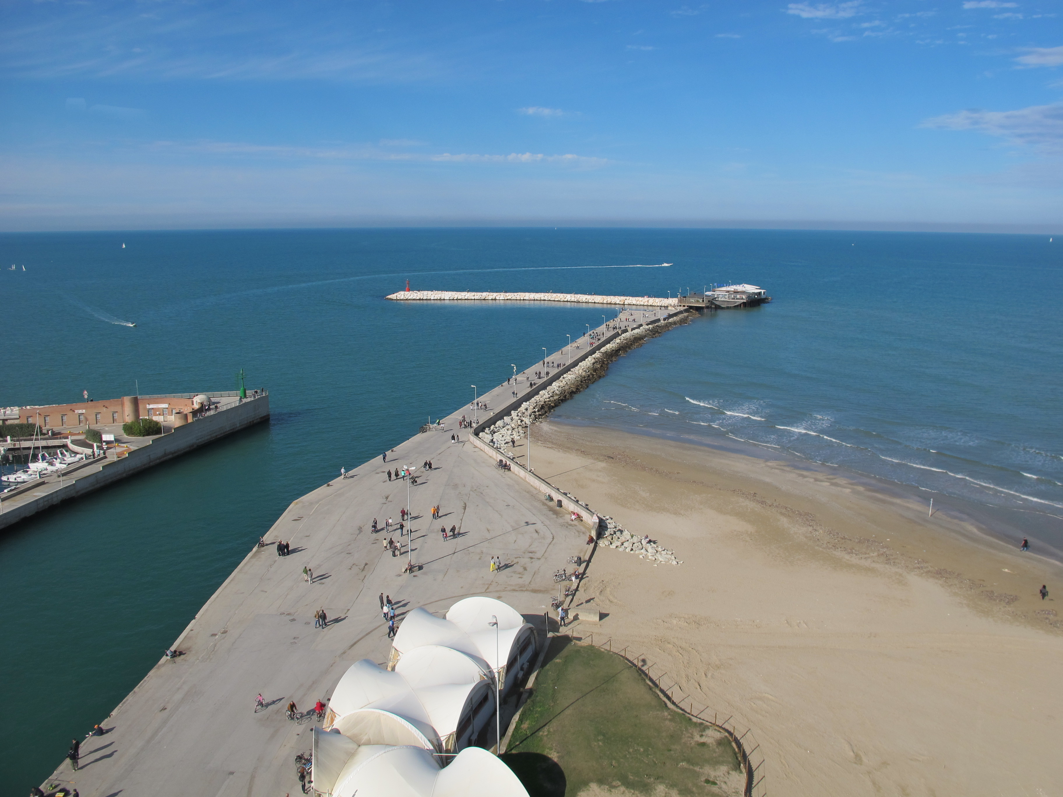 La palata del porto canale di Rimini vista dalla ruota panoramica.